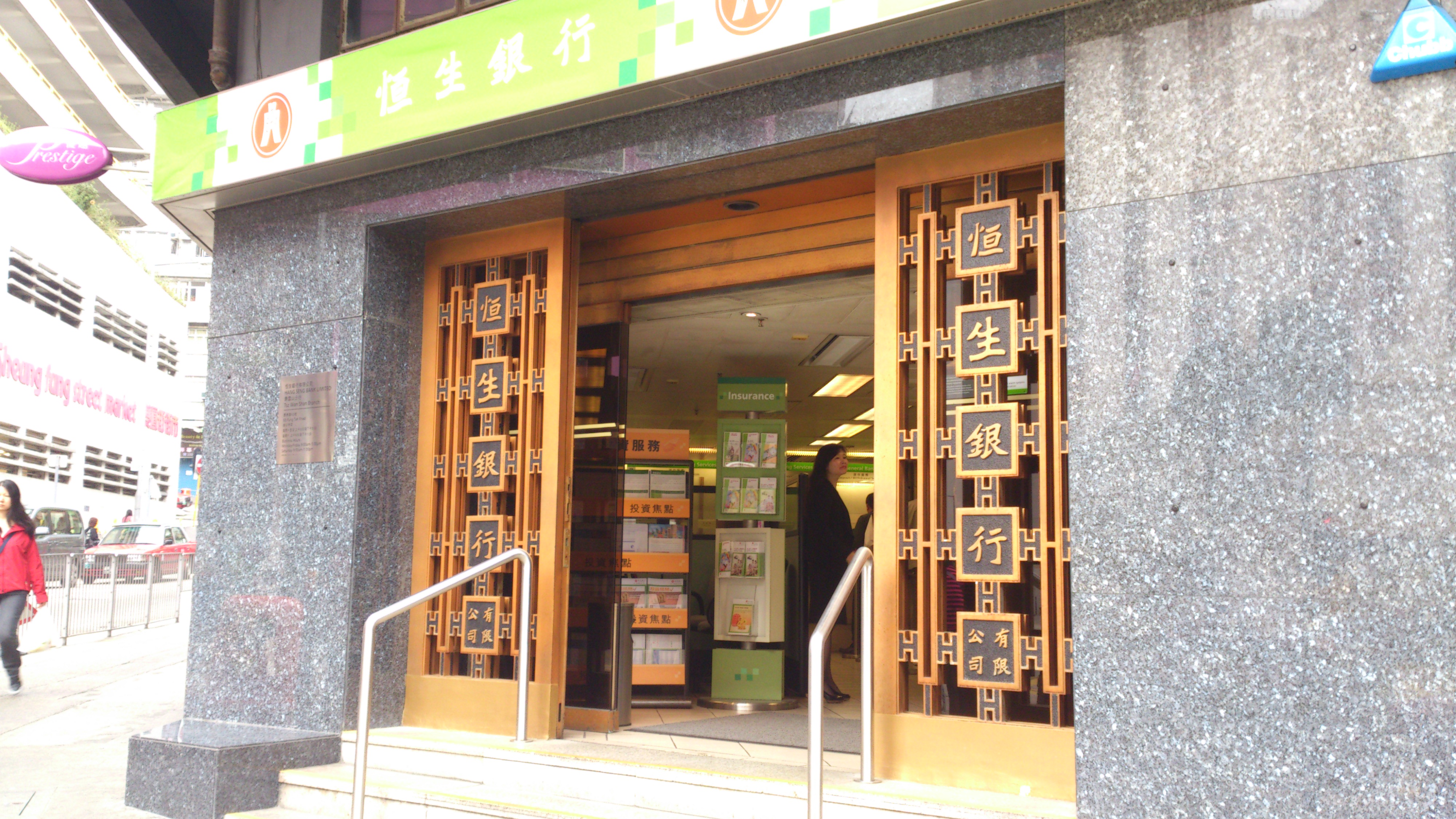 雙鳳街恒生2013